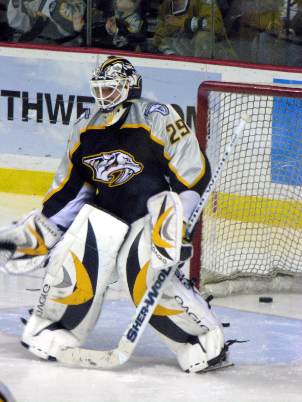 Tomas Vokoun